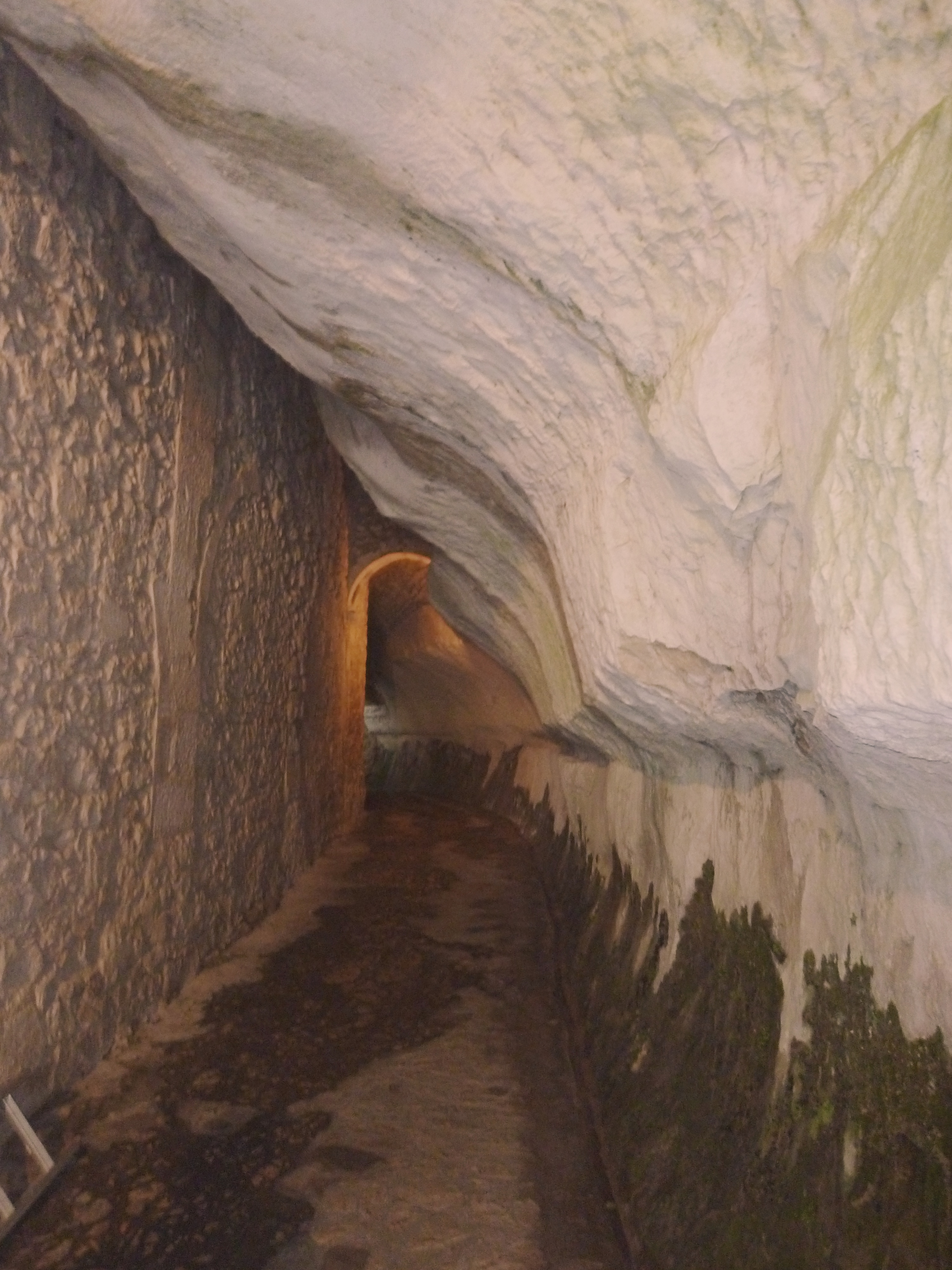 Eremo di Santo Spirito a Majella. Roccamorice, Pescara.